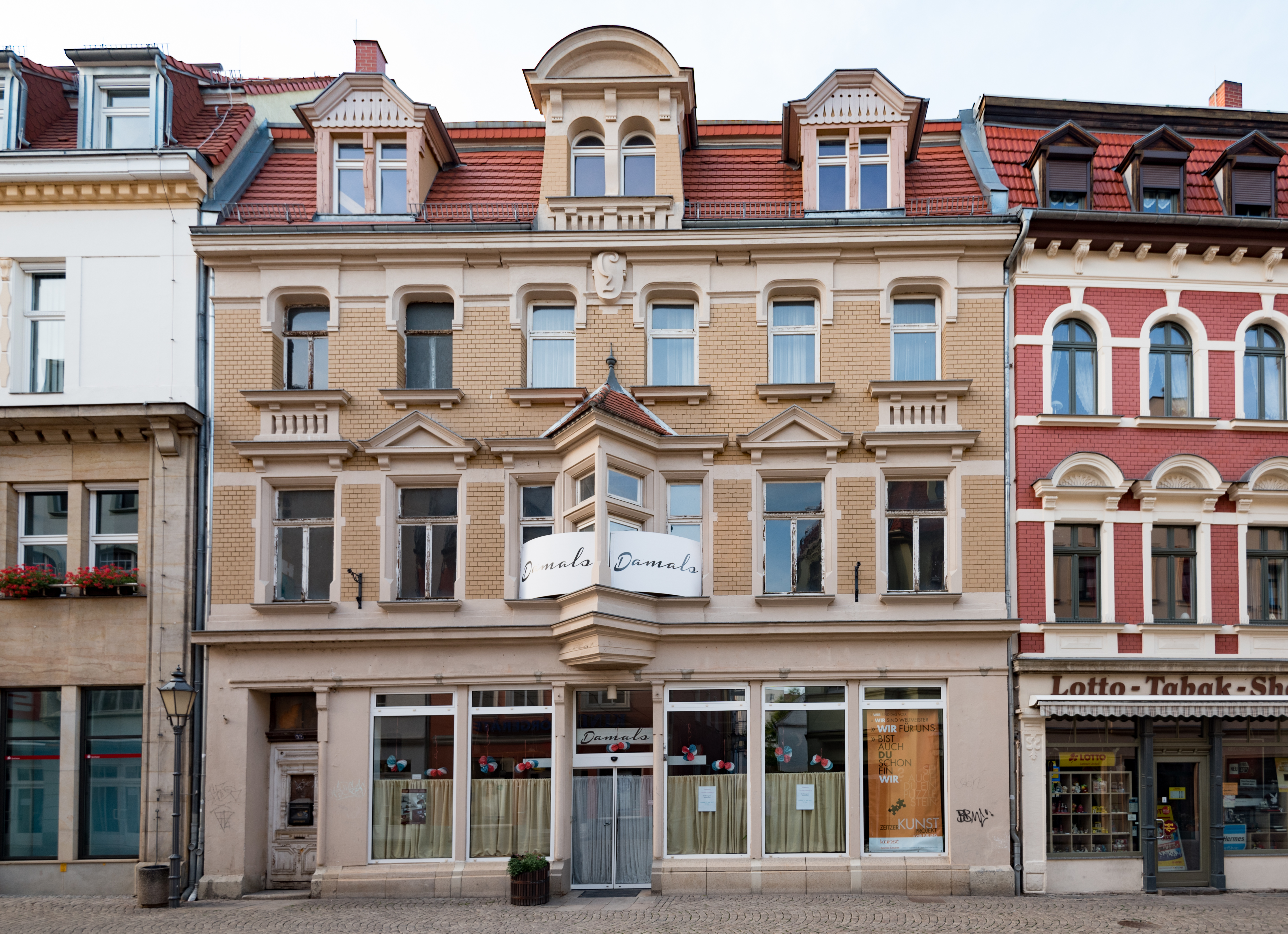 Zeitz, Wendische Straße 32